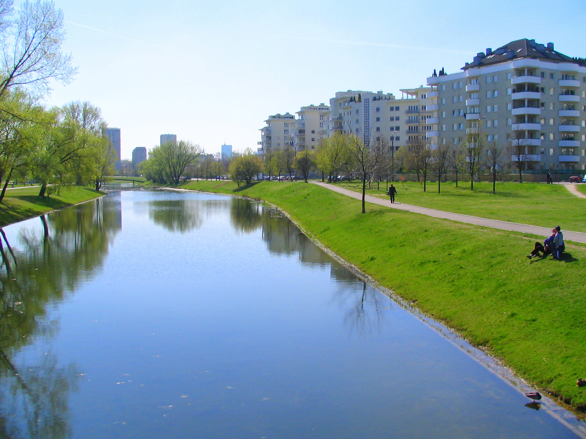 Warszawa Marymont Kępa Potocka